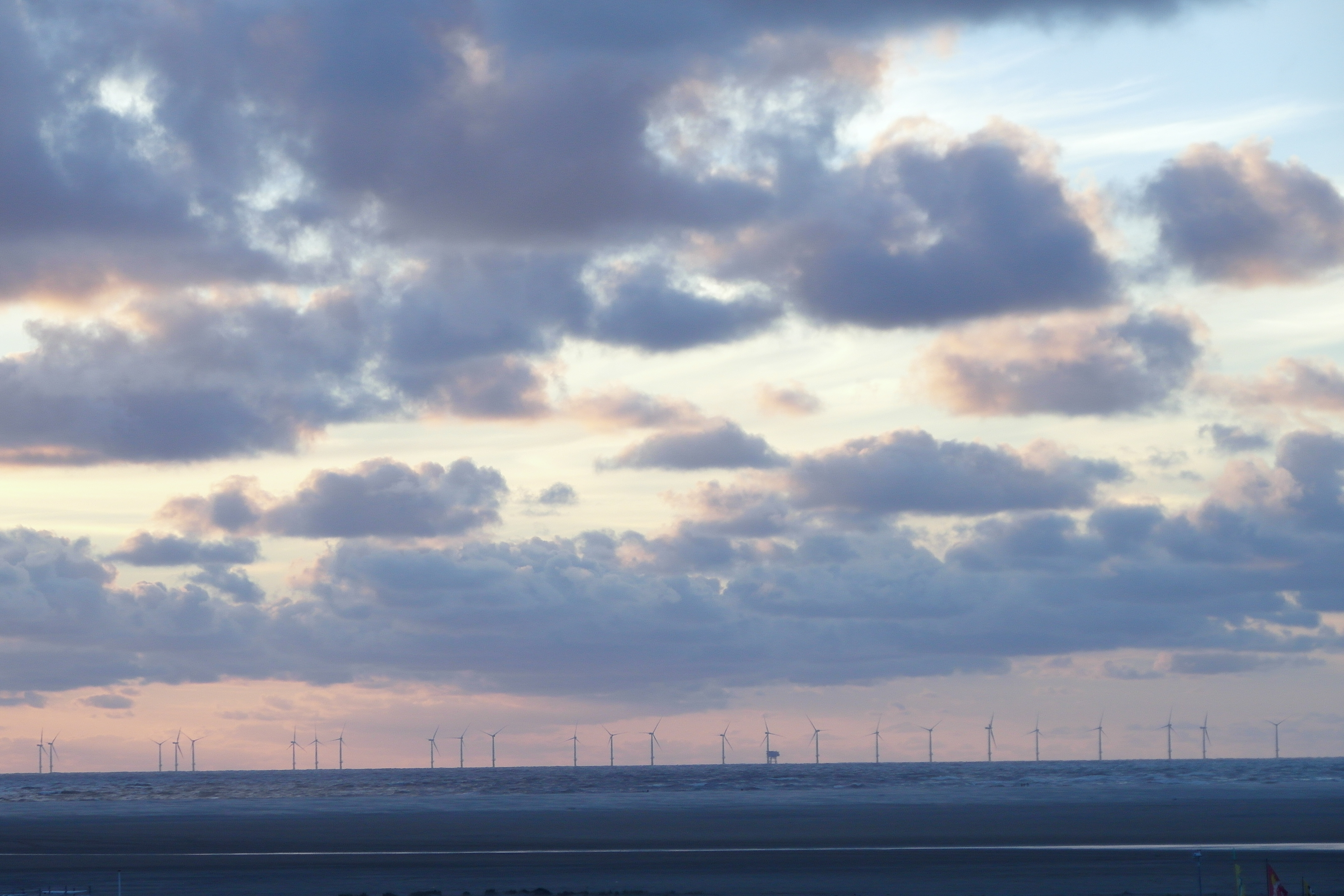 Offshore Windpark Riffgat vom Borkumer Nordstrand fotografiert